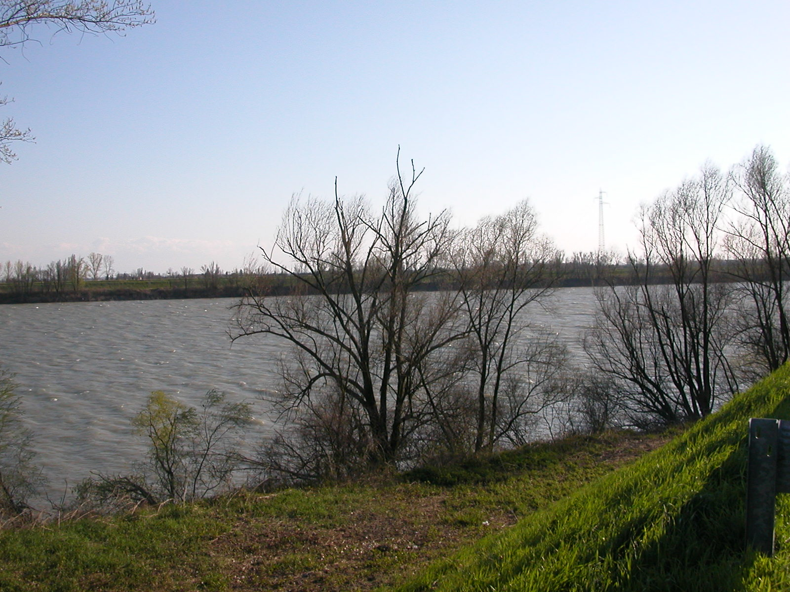 Po presso Polesella, vista verso ovest.